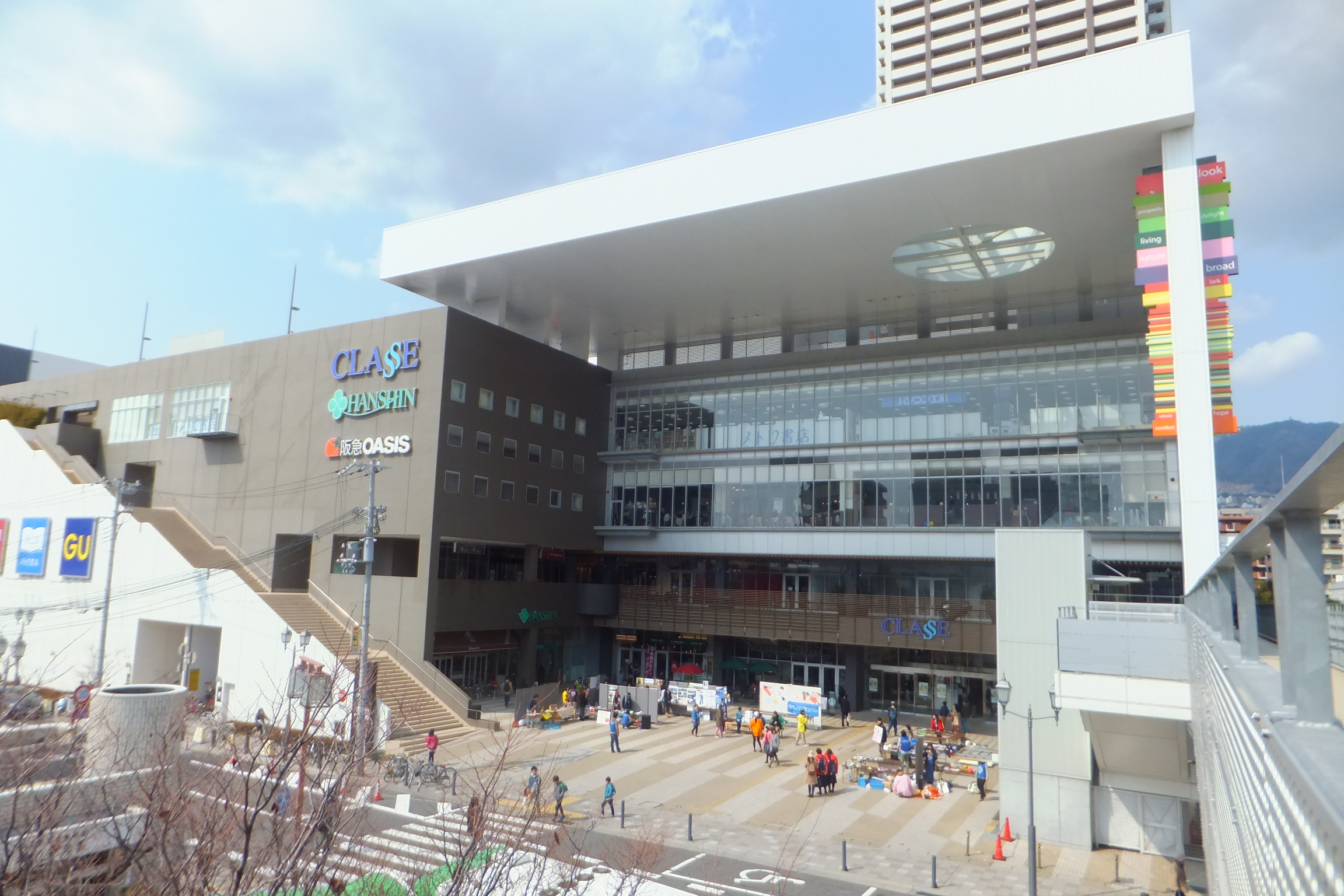 御影クラッセ